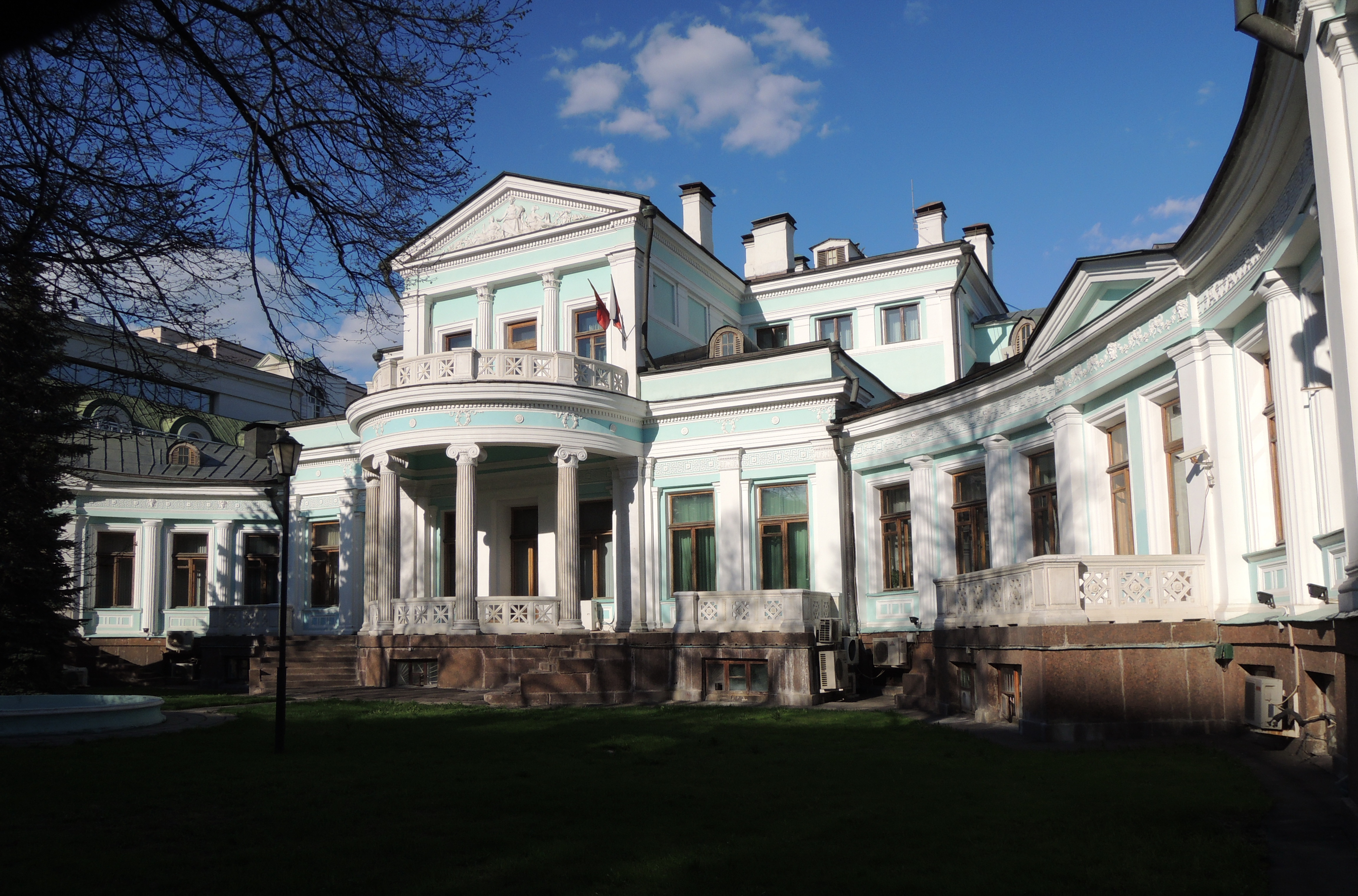 Смоленский бульвар № 26/9 — Особняк К. С. Попова (М. К. Морозовой) (1869; 1876 — полная перестройка и расширение по проекту архитектора А. И. Резанова; 1893—1894 — перестройка архитектором В. А. Мазыриным)